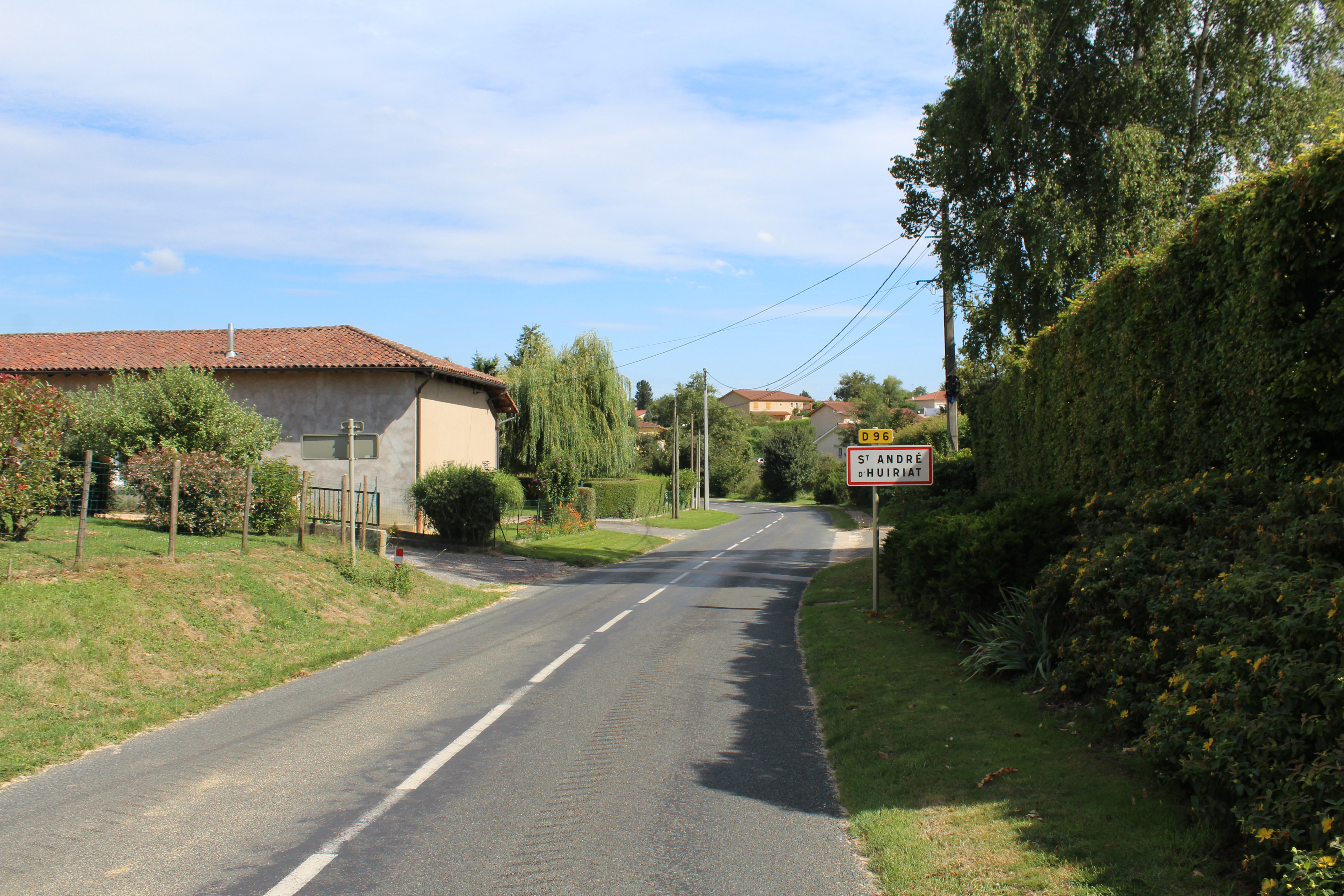 Panneau d'entrée dans Saint-André-d'Huiriat sur la route départementale D96.